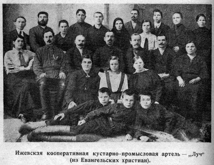 Ижевская кооперативная артель евангельских христиан "Луч", 1925 год